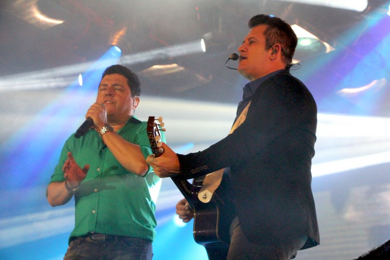 Show - Bruno e Marrone - Chitãozinho e Xororo-010